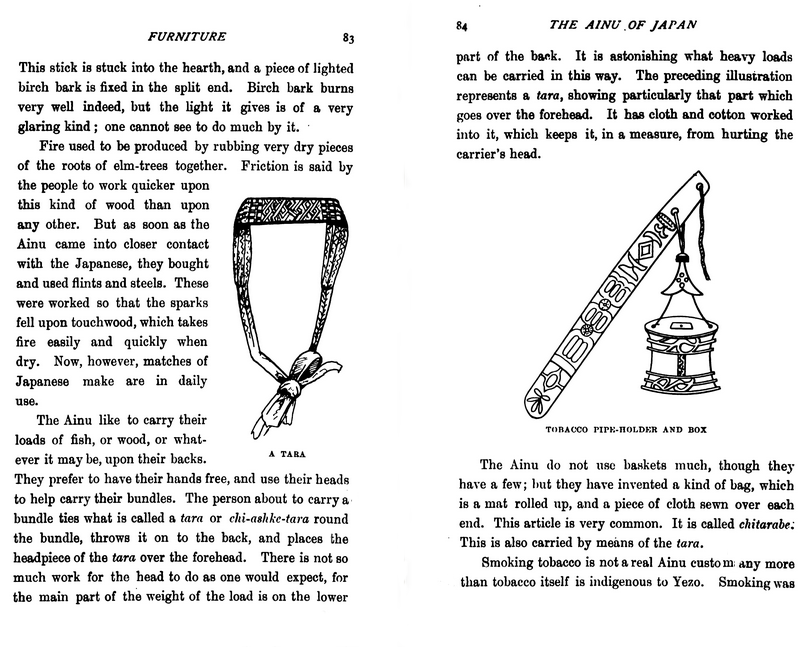 Dictionnaire de John Batchelor (1854-1944), The Ainu of Japan, 1892 ː bandeau porte-charge et boite à tabac.